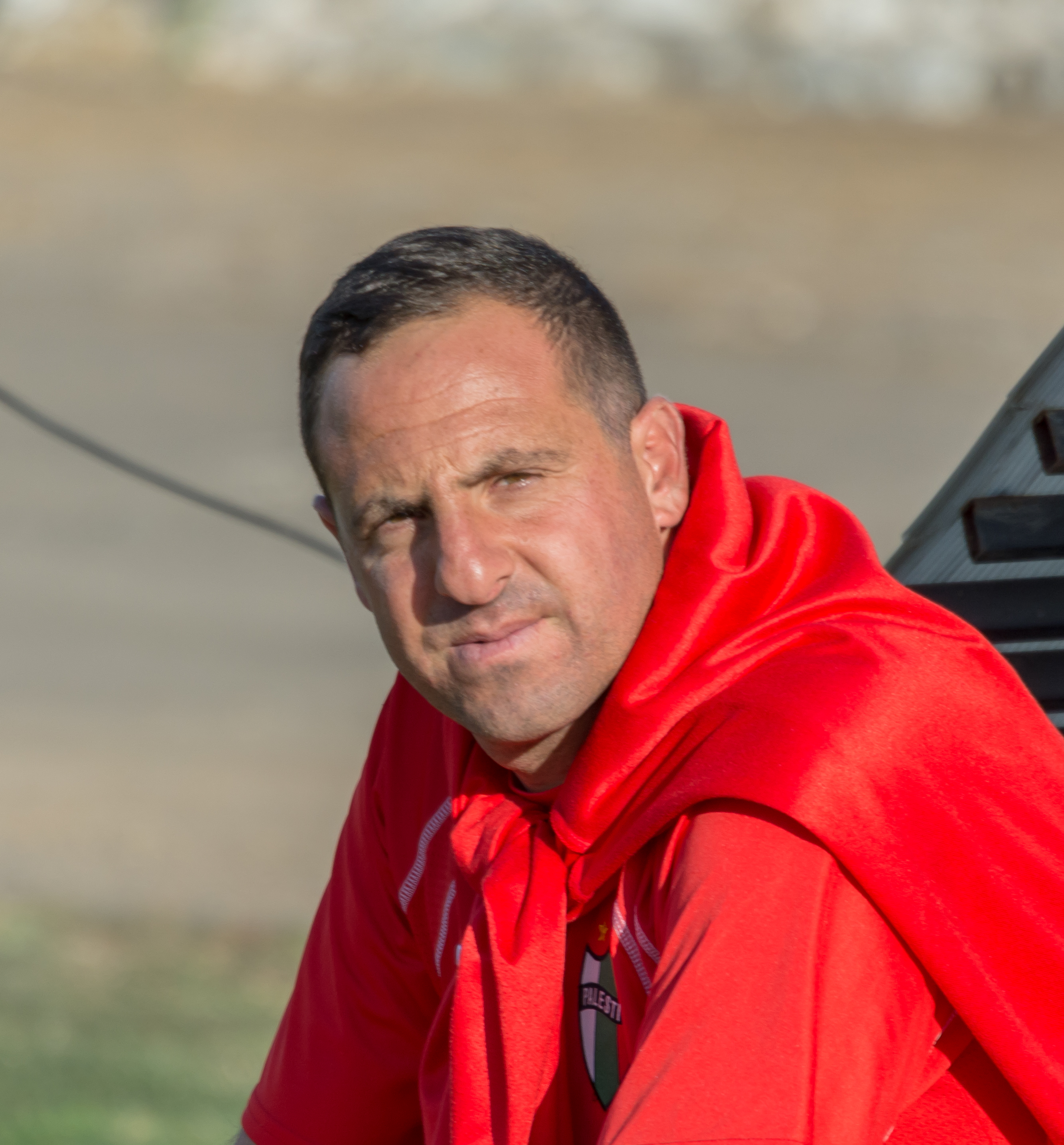 Roberto Bishara, Palestino v O'Higgins, Estadio Municipal de La Cisterna, La Cisterna, Santiago, Chile.